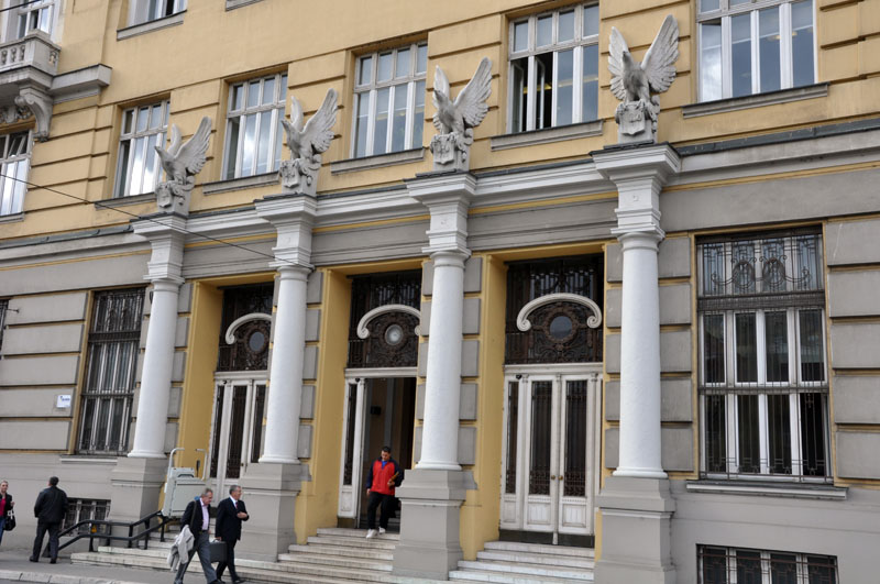 Pošta